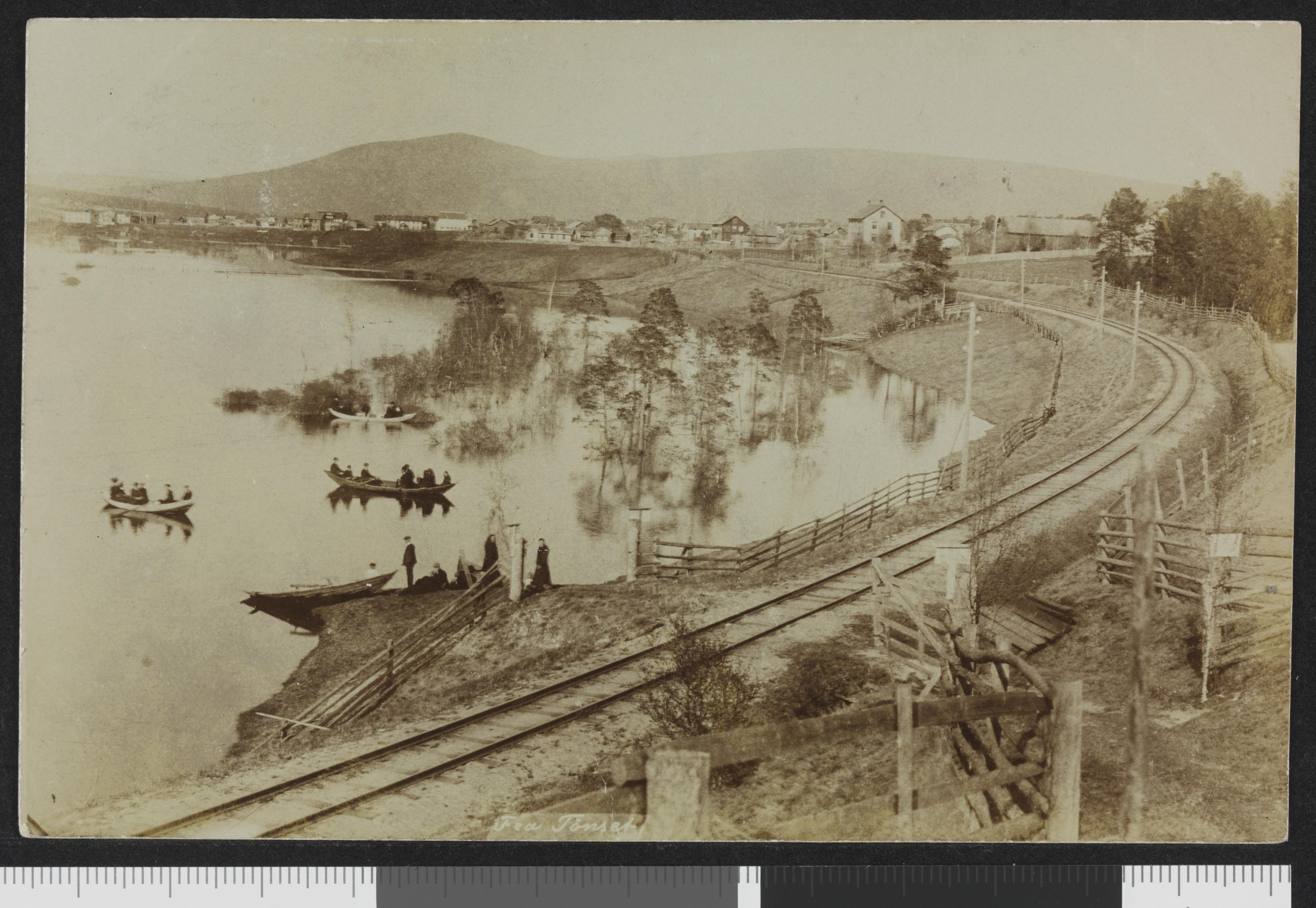 Bildet er hentet fra Nasjonalbibliotekets bildesamling Tynset, Hedmark